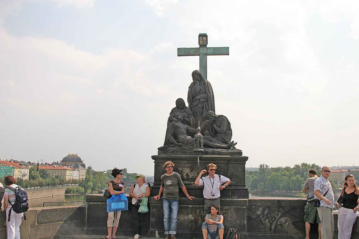 Sousoší Piety na Karlově mostě